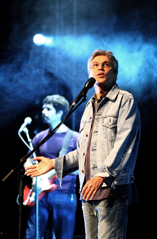 Caetano Veloso no Coliseu de Lisboa.